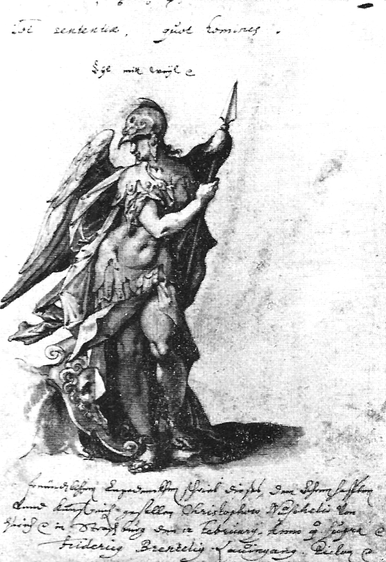 Minerva (Stammbuchblatt, Federzeichnung laviert)